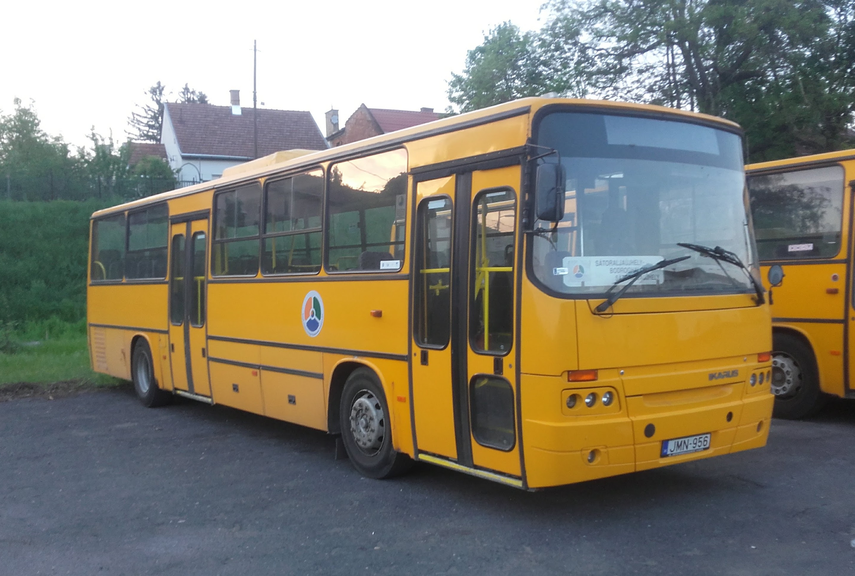 Az ÉMKK JMN-956 rendszámú Ikarus C56 típusú busza Sátoraljaújhelyen, a 3920-as helyközi járaton.